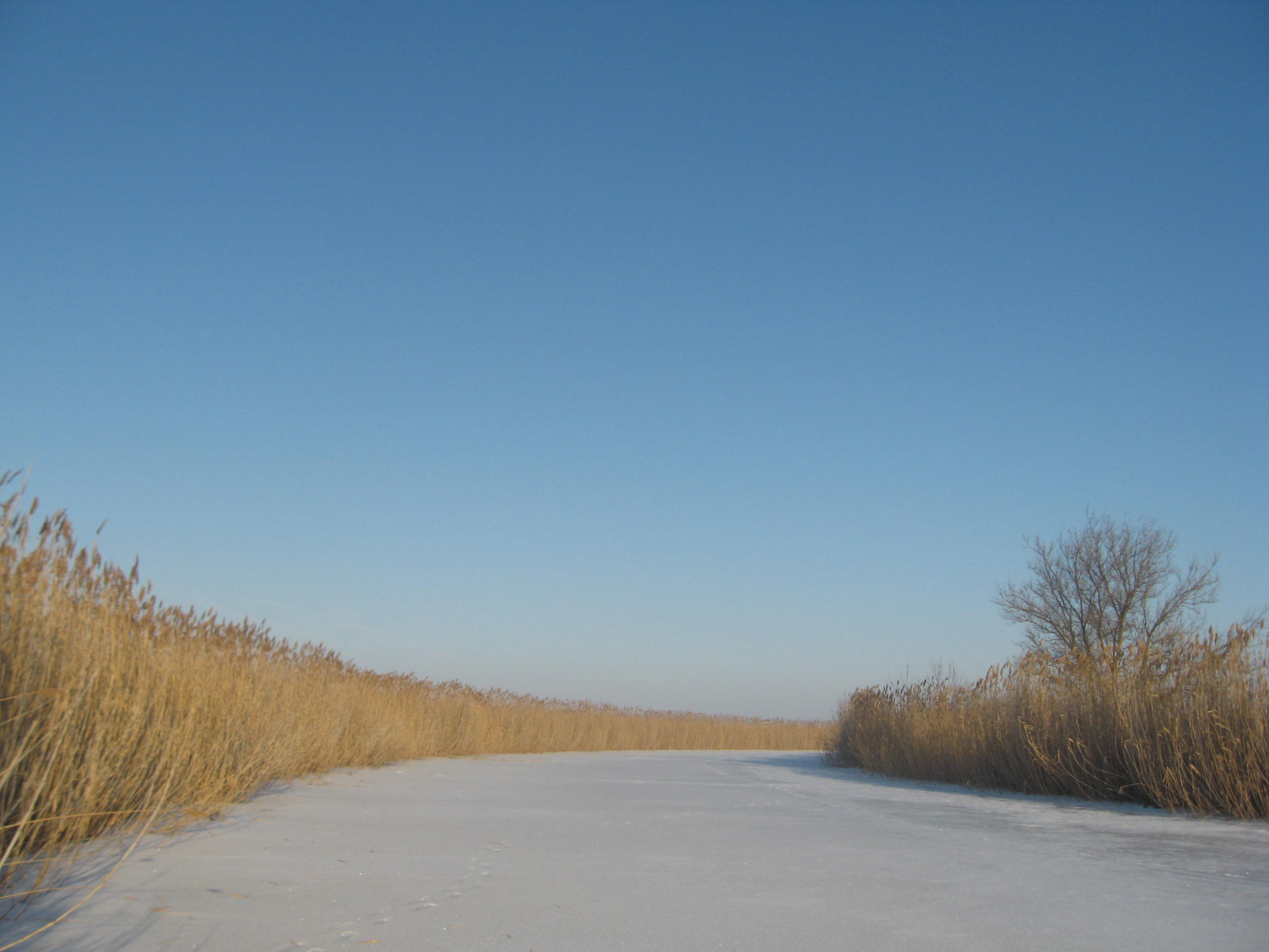 Река Курлак зимой. Видный берега реки, поросшие камышом.